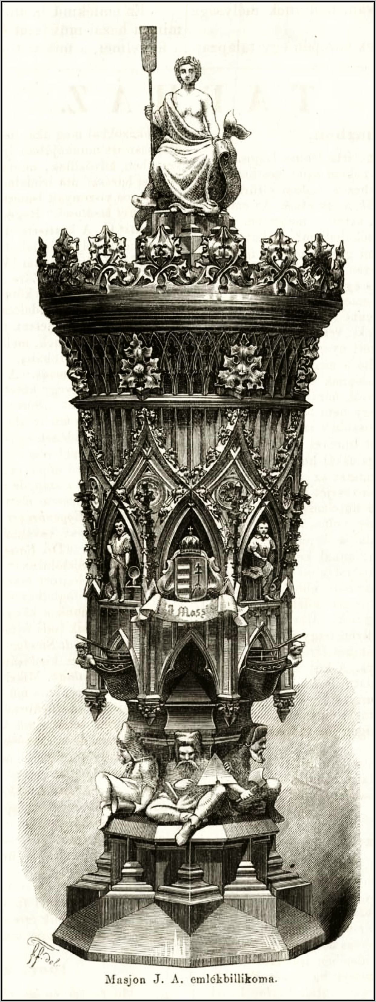 John Andrew Masjon, névváltozata: Massion (Dordrecht, Hollandia, 1817. február 7. – Pest, 1858. szeptember 19.) hajómérnök, hajóskapitány, az Óbudai Hajógyár igazgatójának búcsú ezüst serlege, Feszl Frigyes terve